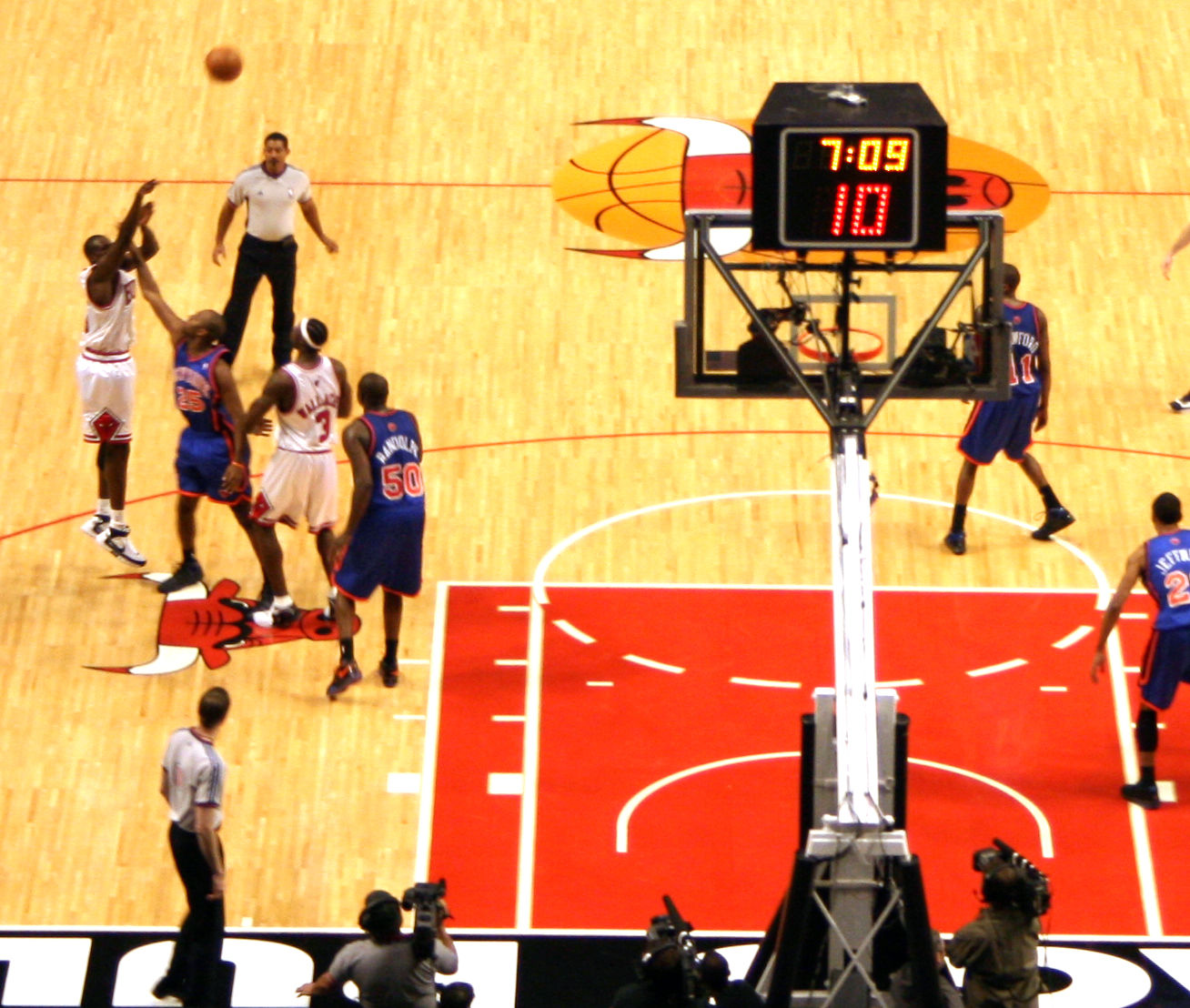 ファイル:Deng shot 121407.jpg をトリミングしたものです。Original uploader was Gavindow at en.wikipedia/ triming File:Deng shot 121407.jpg